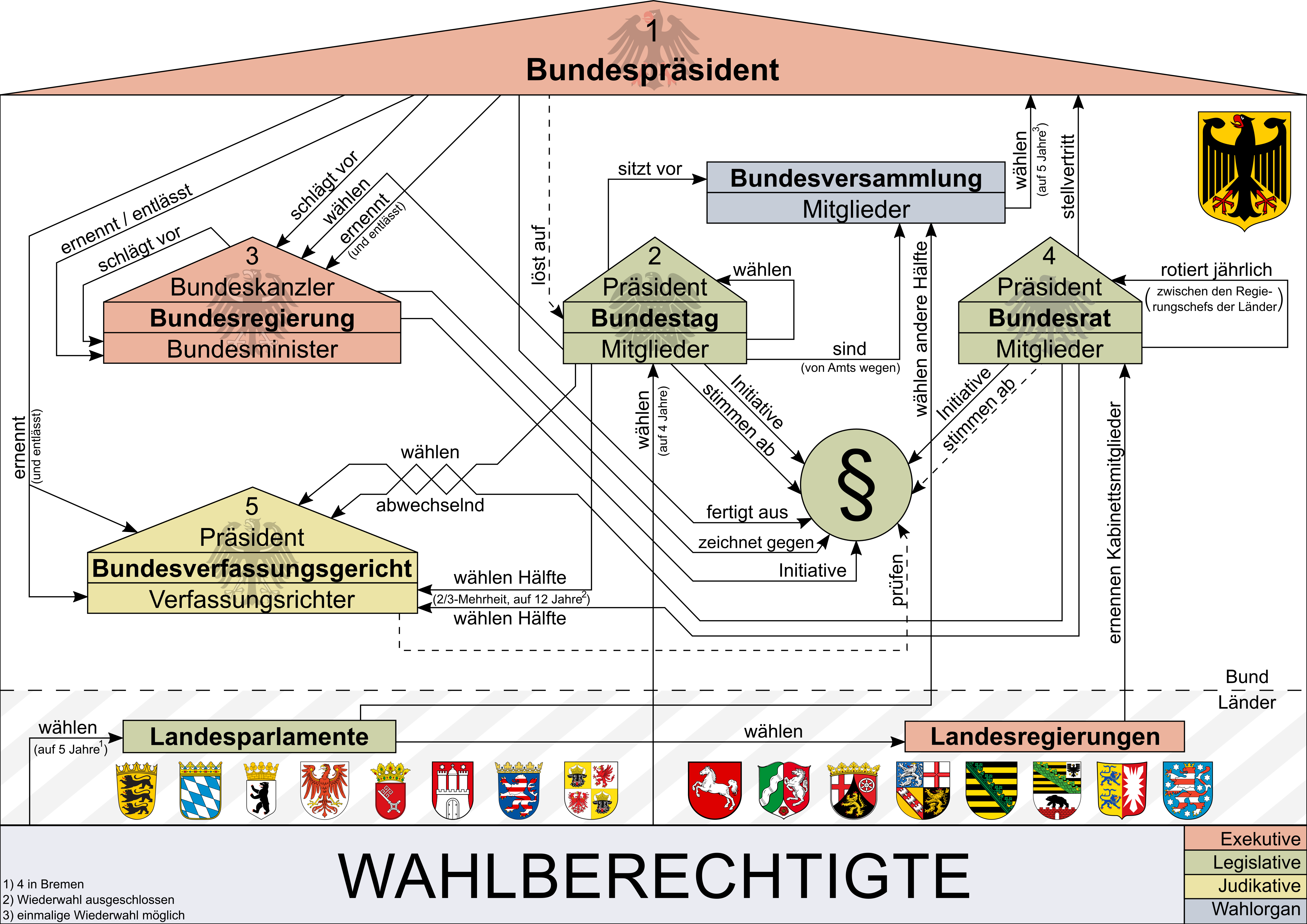 Politisches System der Bundesrepublik Deutschland. Exekutive Legislative Judikative Wahlorgan Ziffern: protokollarische Rangordnung gestrichelte Pfeile: unter Bedingungen, die darzustellen den Rahmen dieses Diagramms sprengen würde Landeswappen (v.l.n.r): Baden-Württemberg, Bayern, Berlin, Brandenburg, Bremen, Hamburg, Hessen, Mecklenburg-Vorpommern, Niedersachsen, Nordrhein-Westfalen, Rheinland-Pfalz, Saarland, Sachsen, Sachsen-Anhalt, Schleswig-Holstein, Thüringen